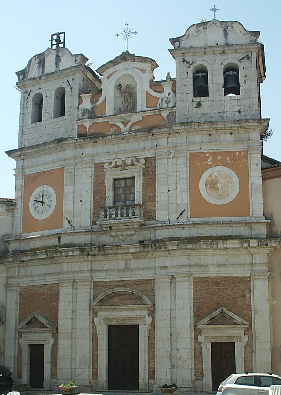 Cattedrale di Atina